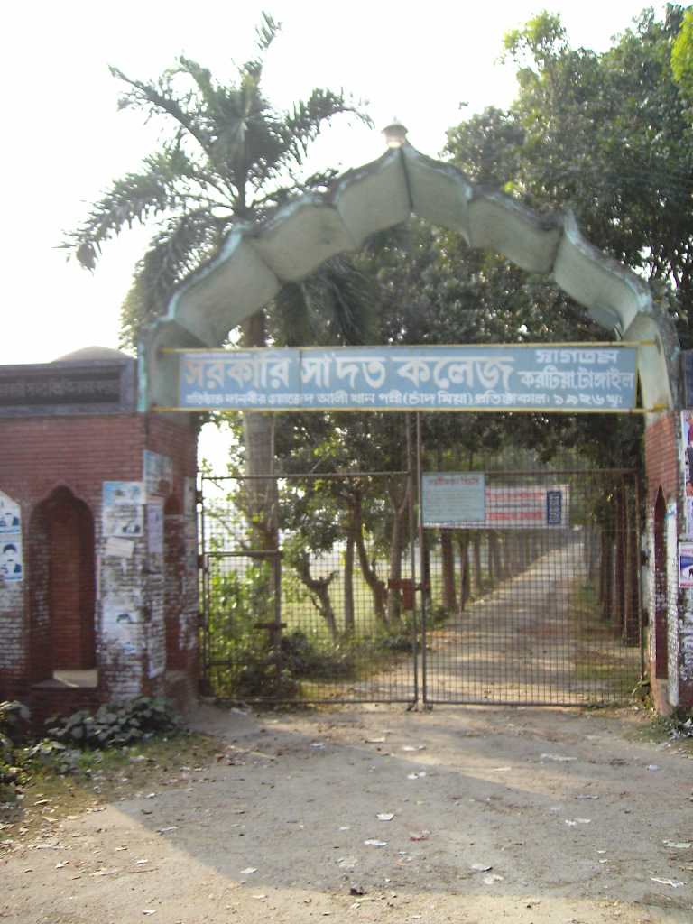 Entrance to Saadat college